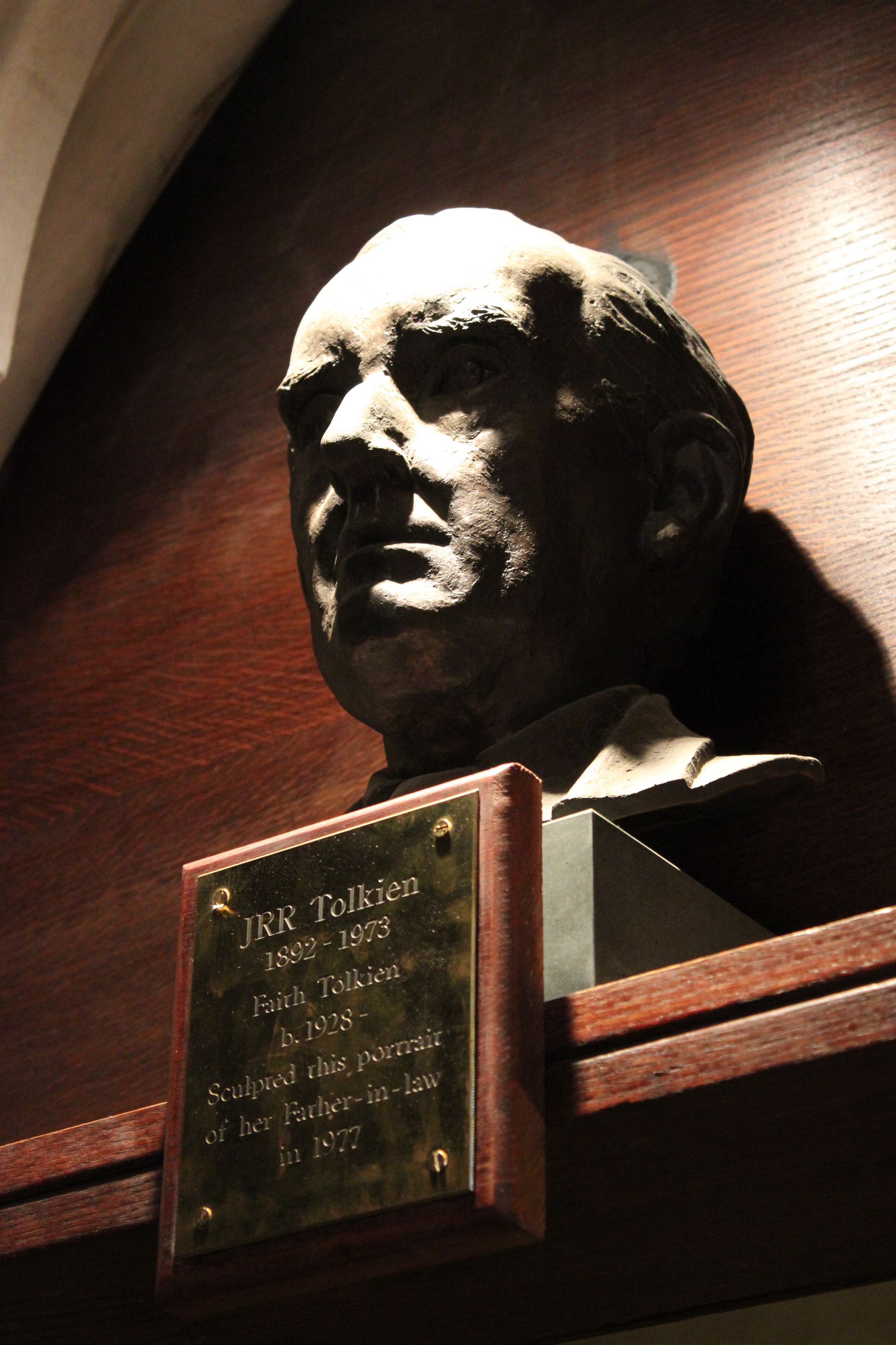 Büste von J. R. R. Tolkien im Oxforder Exeter College, angefertigt von Tolkiens Schwiegertochter Faith.